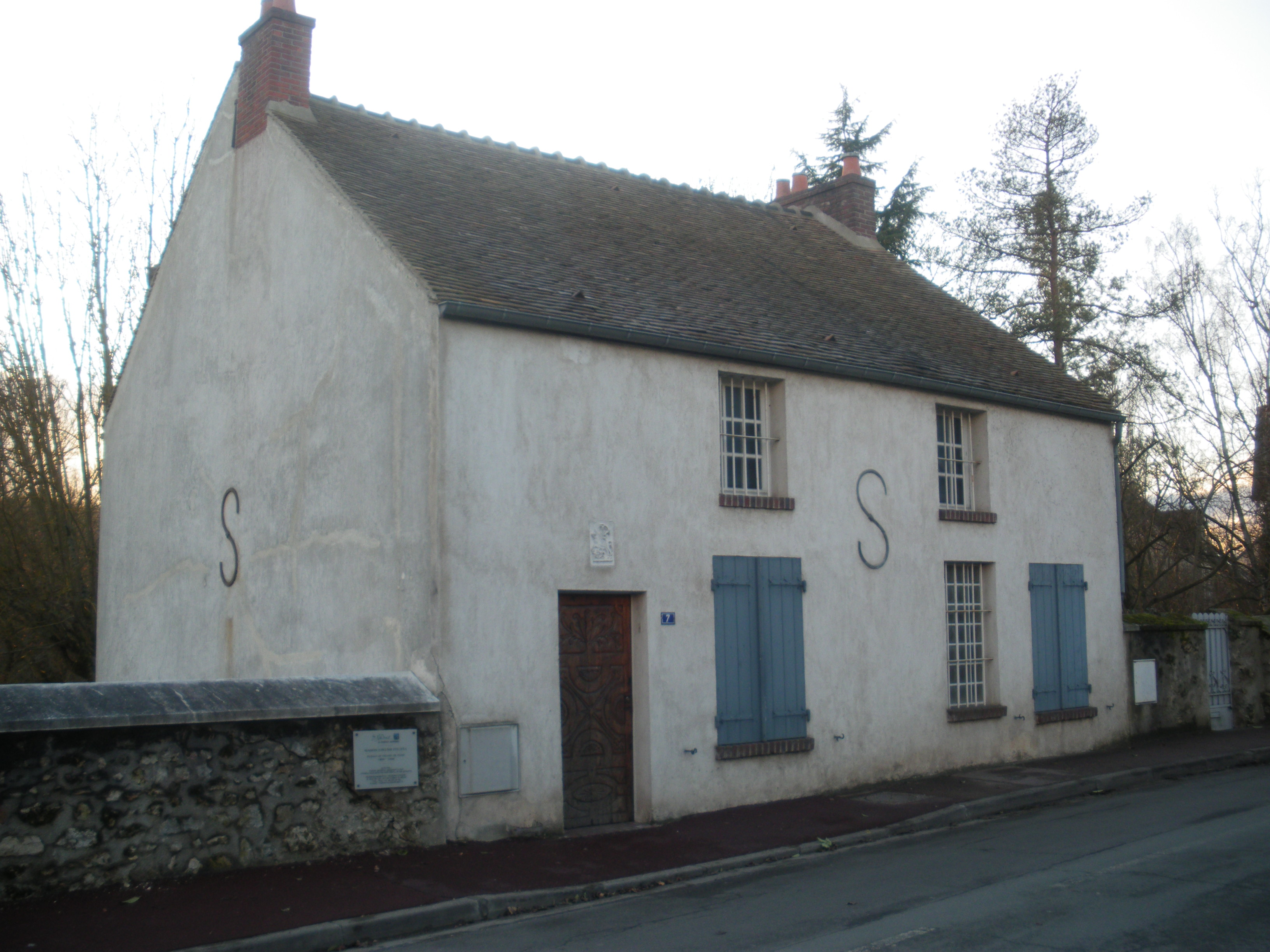 Musée Foujita, Villiers le Bacle, Essonne, France